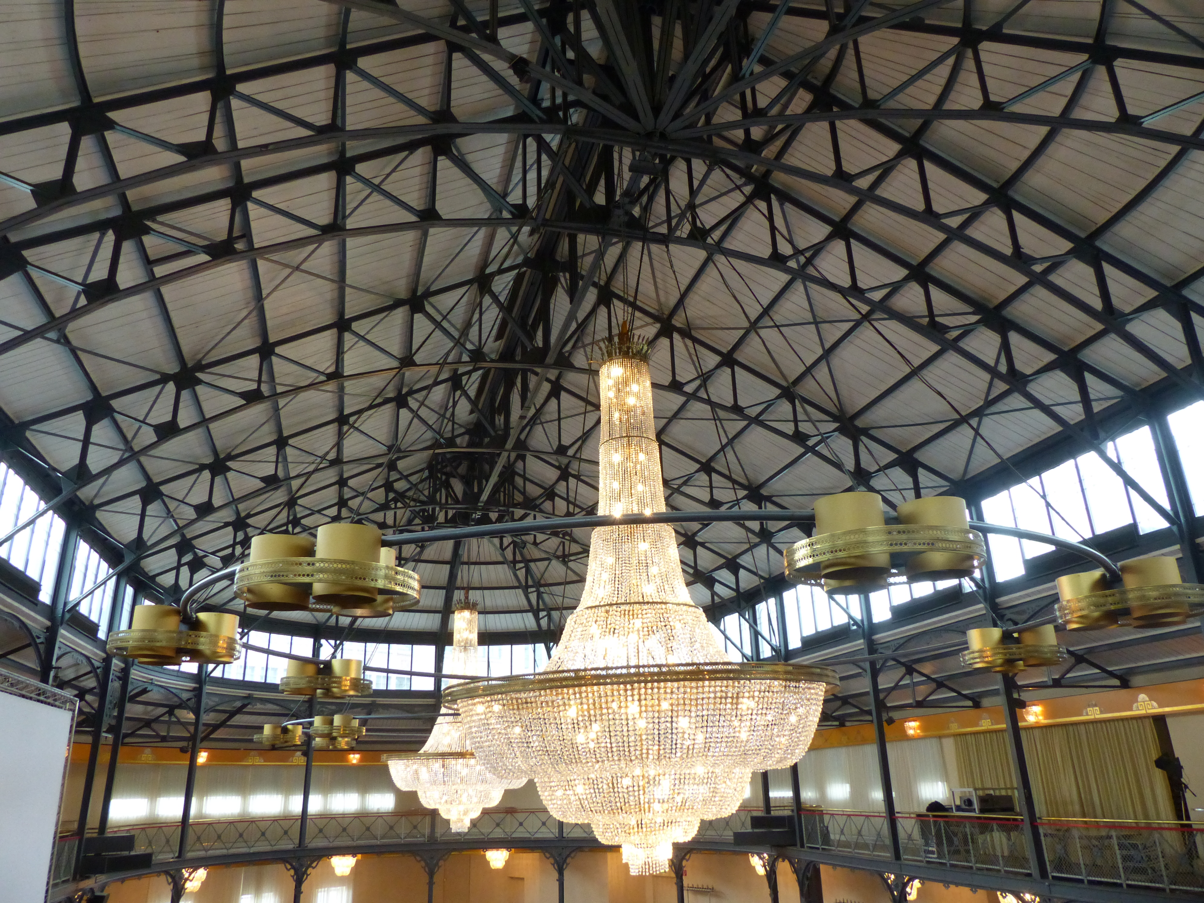 zwei Kronleuchter, jeweils 7,5 m im Durchmesser und 1,5 t schwer